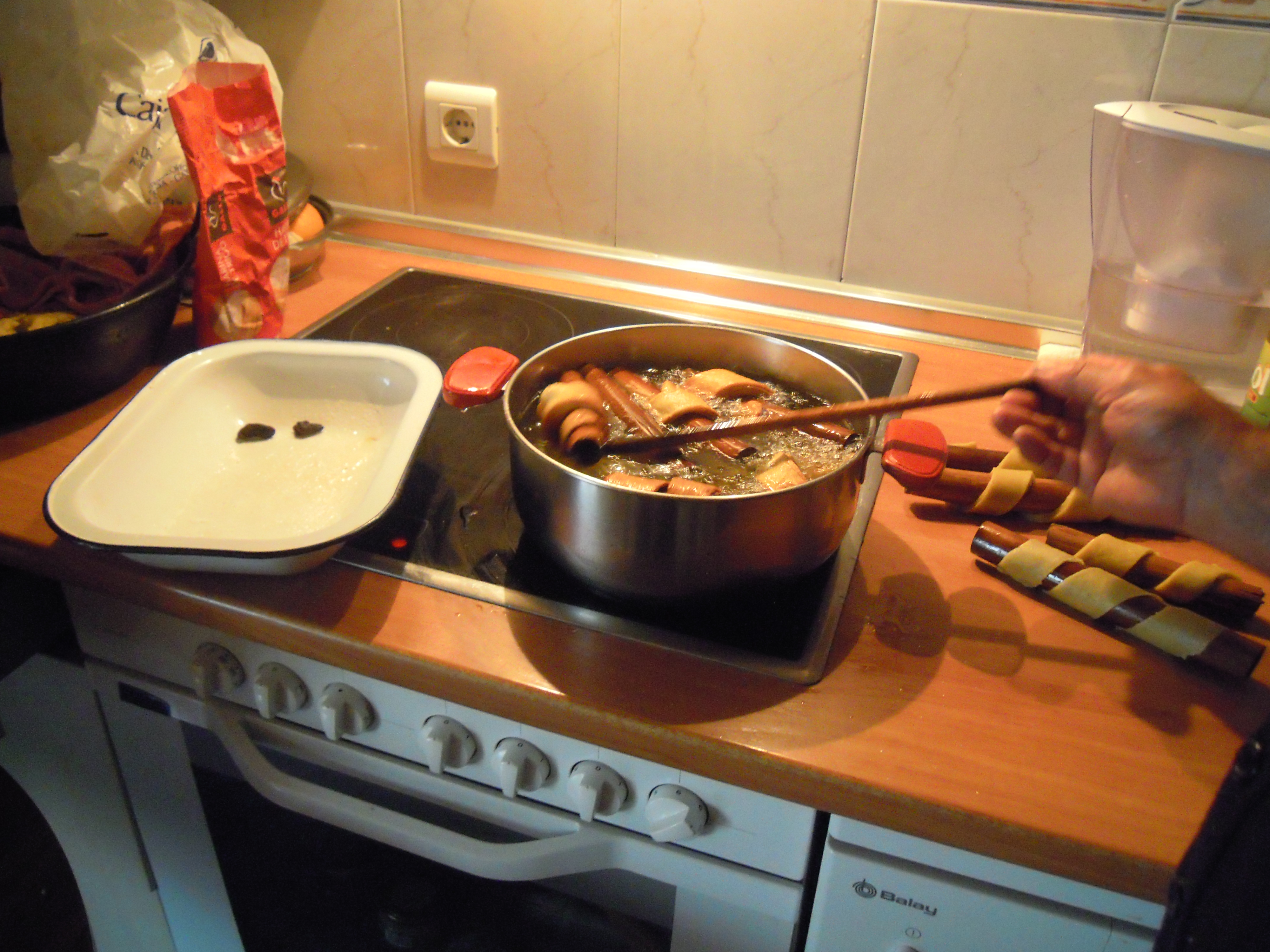 sacatrapos